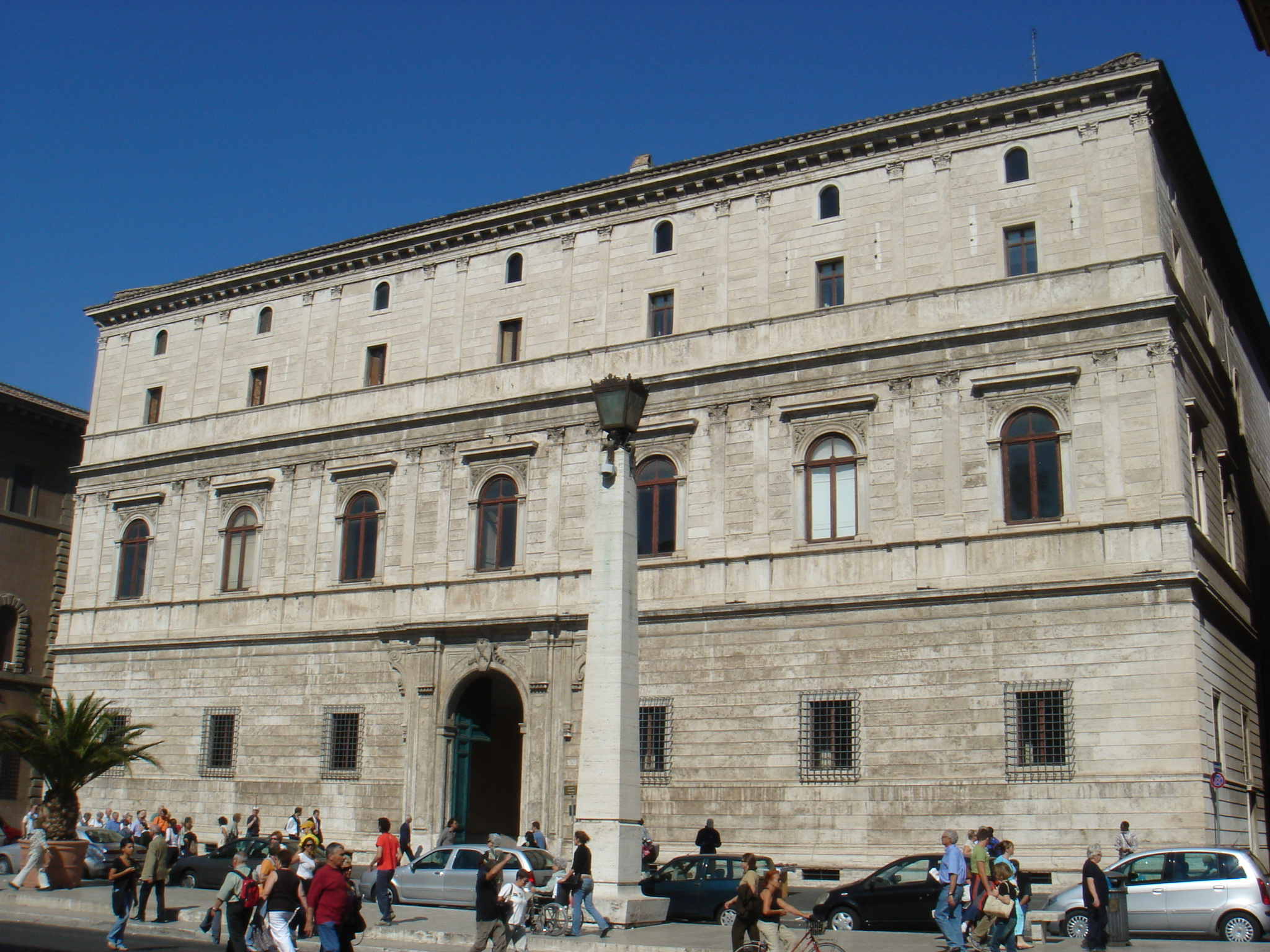 Roma, via della Conciliazione: palazzo Giraud Torlonia